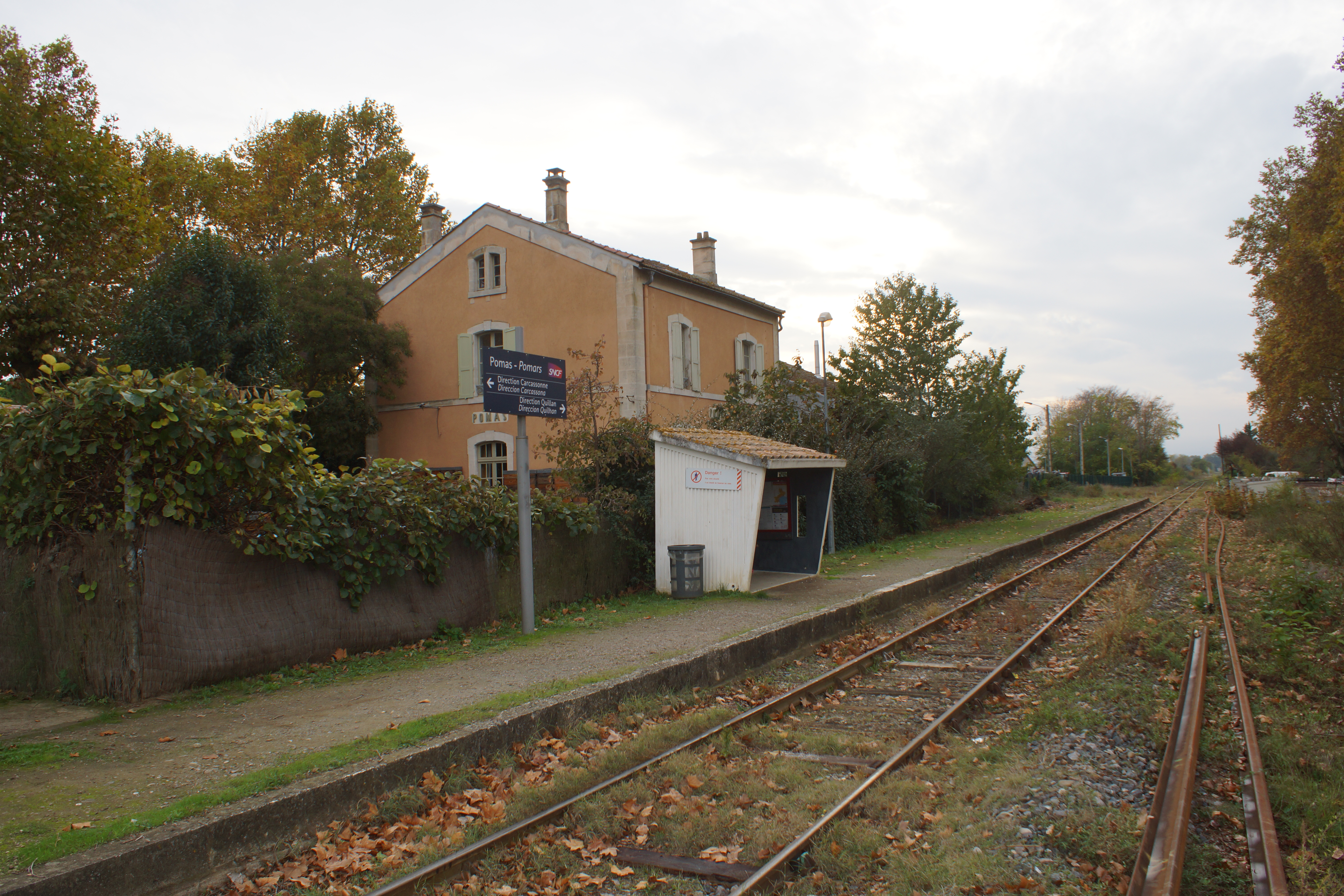 Gare de Pomas : Derrière la haie l'ancien bâtiment voyageurs et devant la voie, le quai et l'abri de quai de la halte SNCF.